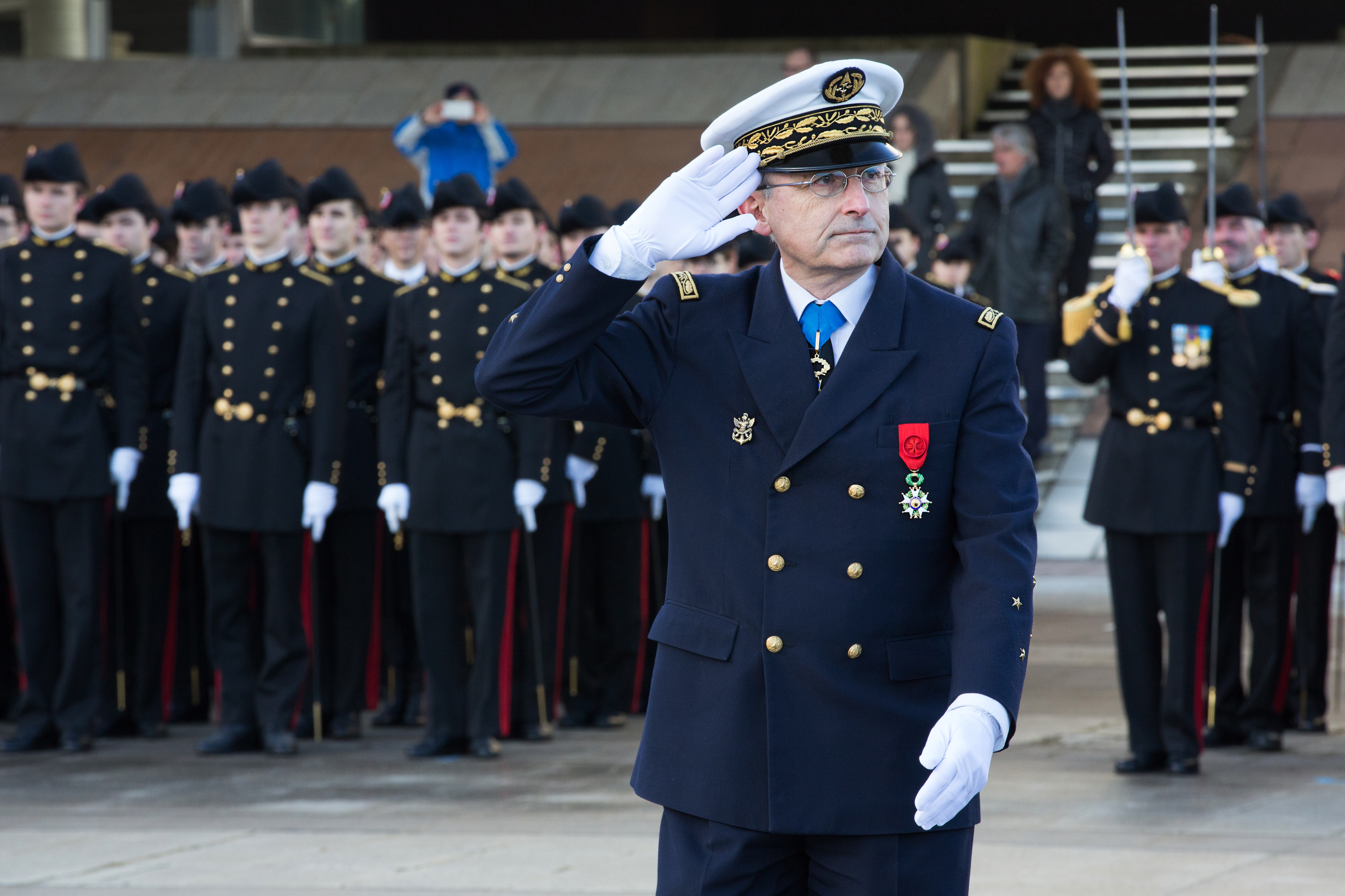 Adieu aux armes d'Yves Demay et prise de fonction de directeur général de l'Ecole polytechnique par François Bouchet.